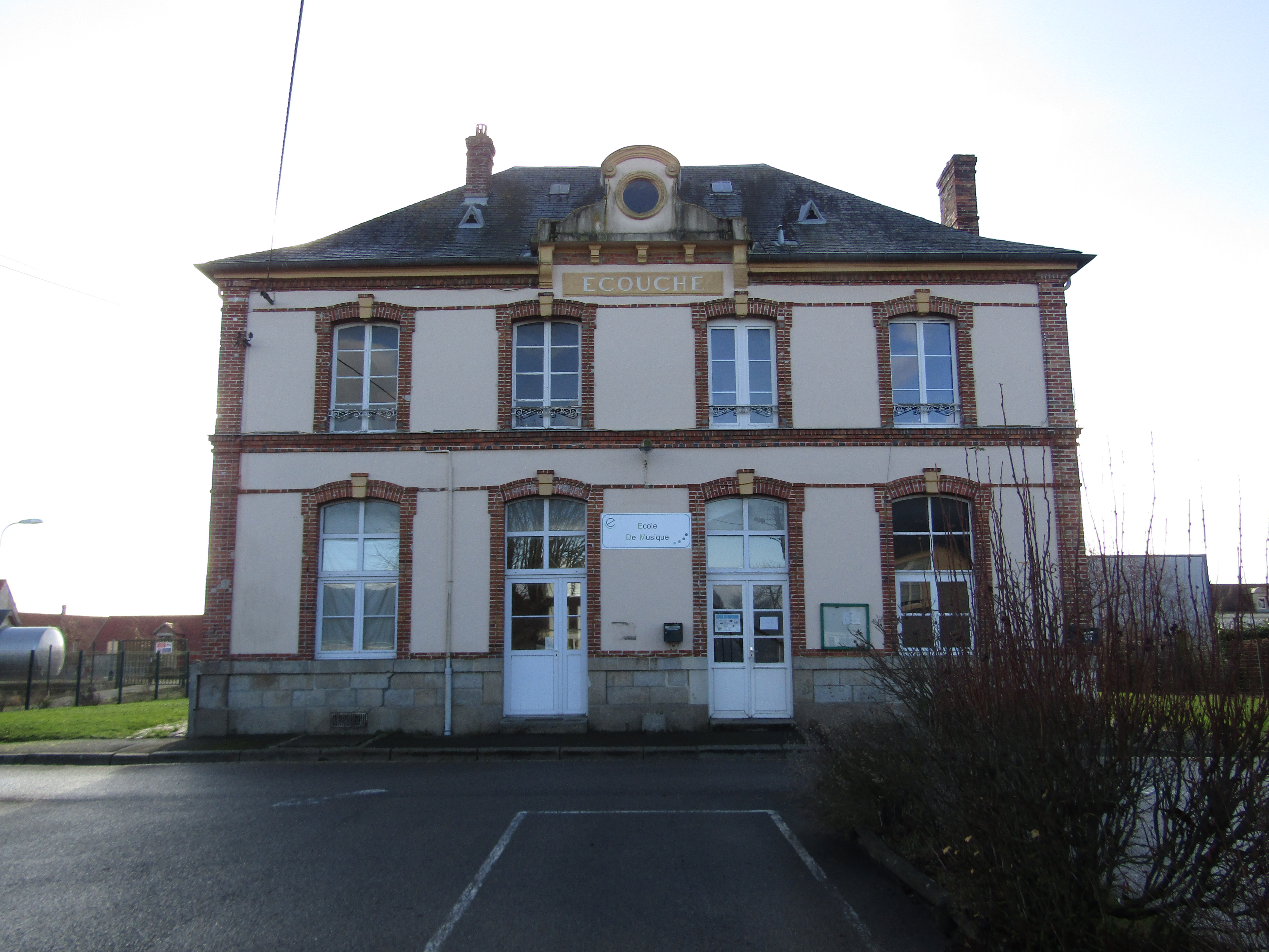 L'ancien bâtiment voyageurs de la gare d'Écouché, transformé en école de musique, en 2019